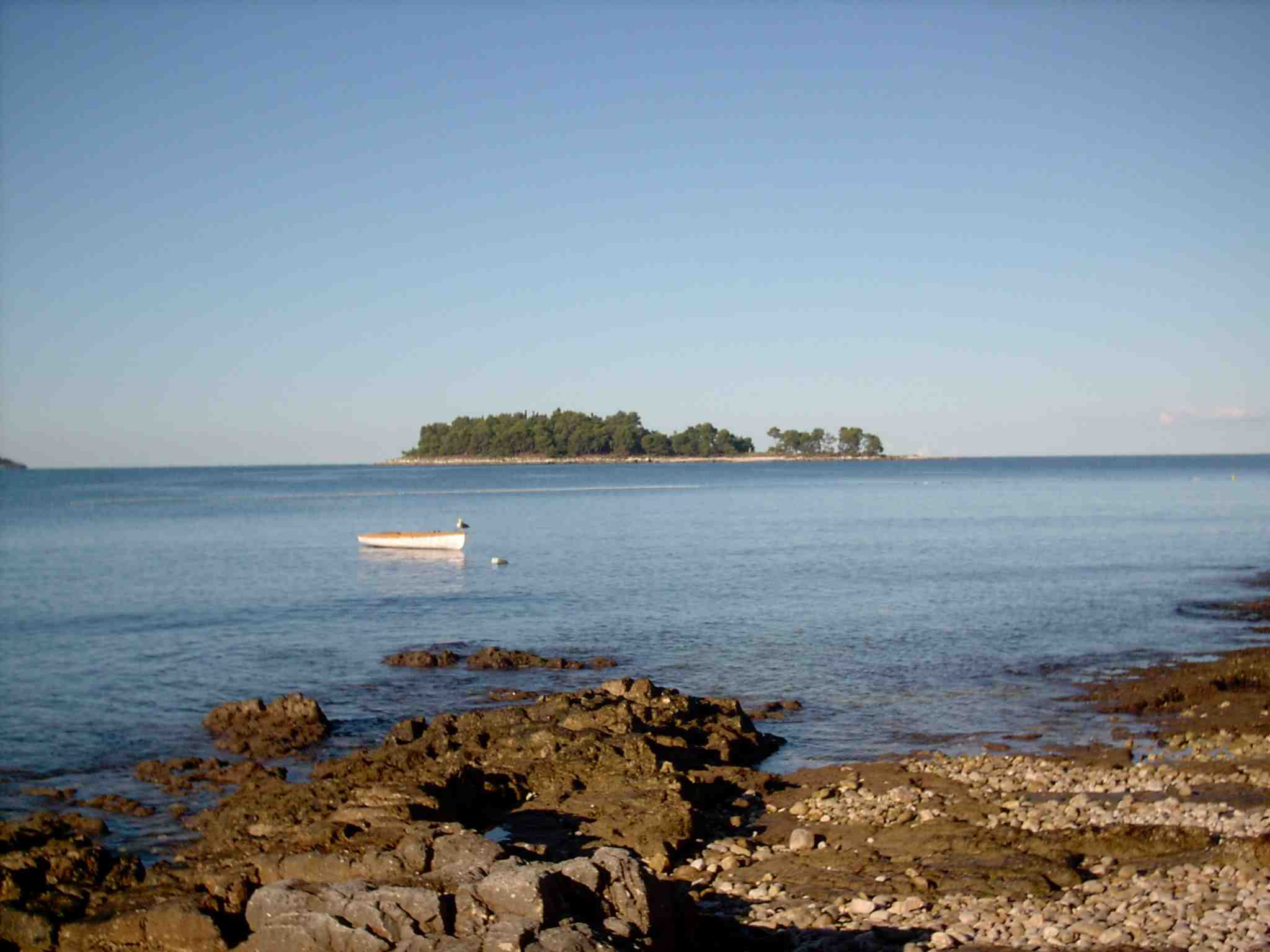 Das Inselchen Figarola, vor Rovinj, Kroatien